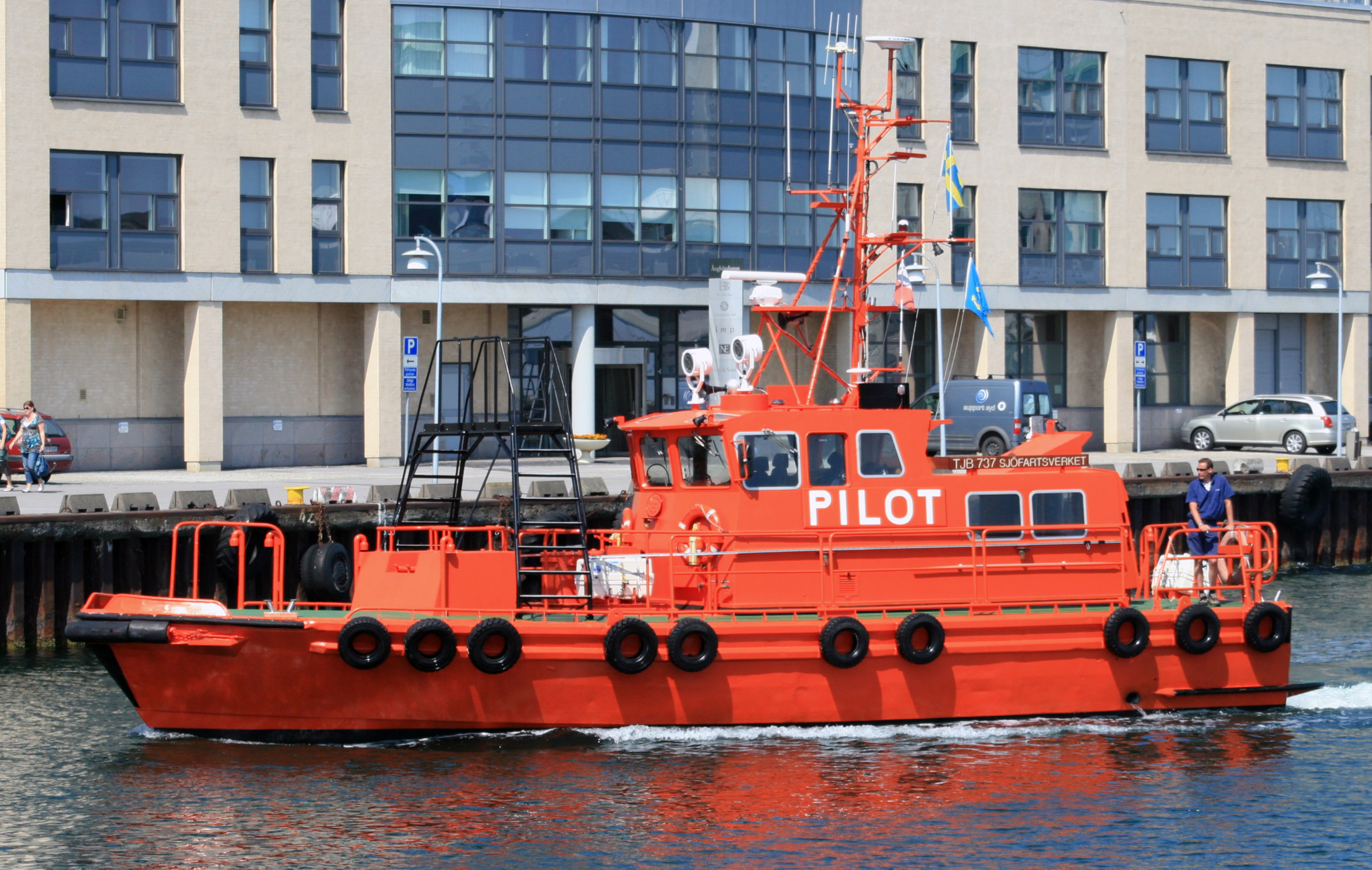 Pilot 737 SE i Malmö 2 juli 2009.